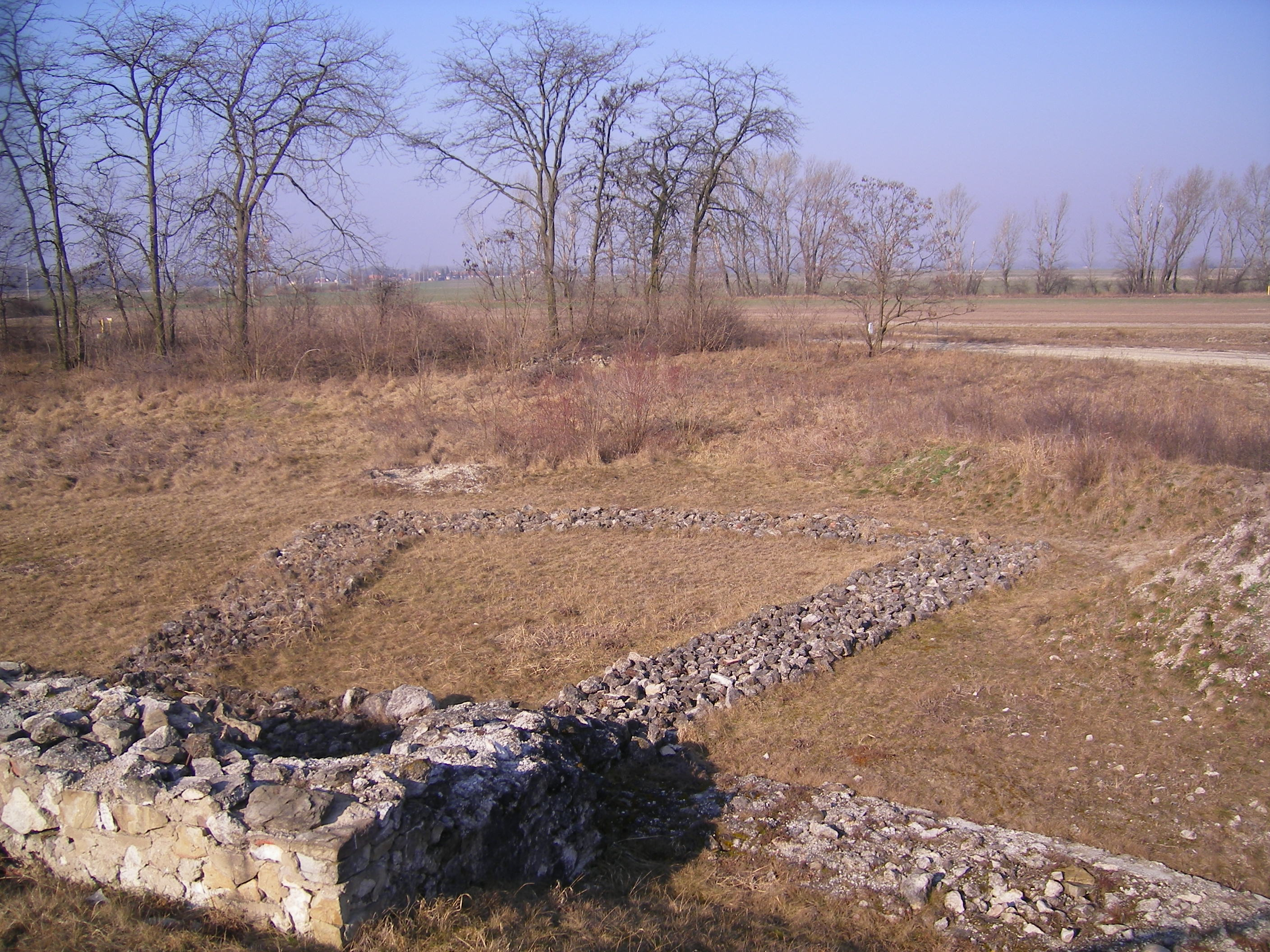 Izsa - Celemantia római tábor alapjai.